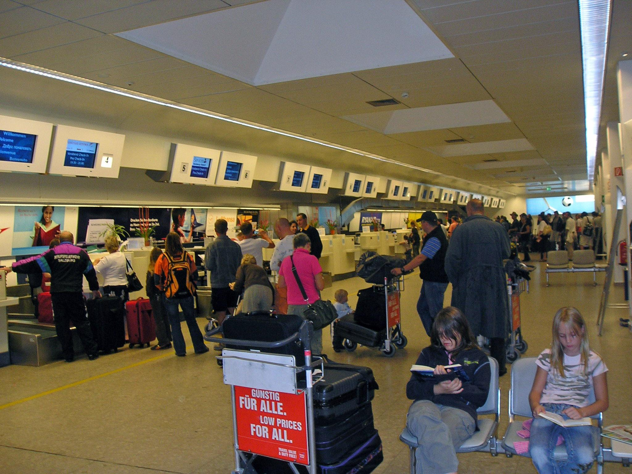 Salzburg Airport in Austria